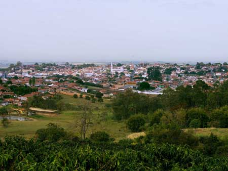 Vista de Monte Santo de Minas, MG - Brasil. Fotografado por Rainer P. Novelli em setembro de 2005. Para acessar magem de maior definição: Imagem maior de Monte Santo de Minas MG